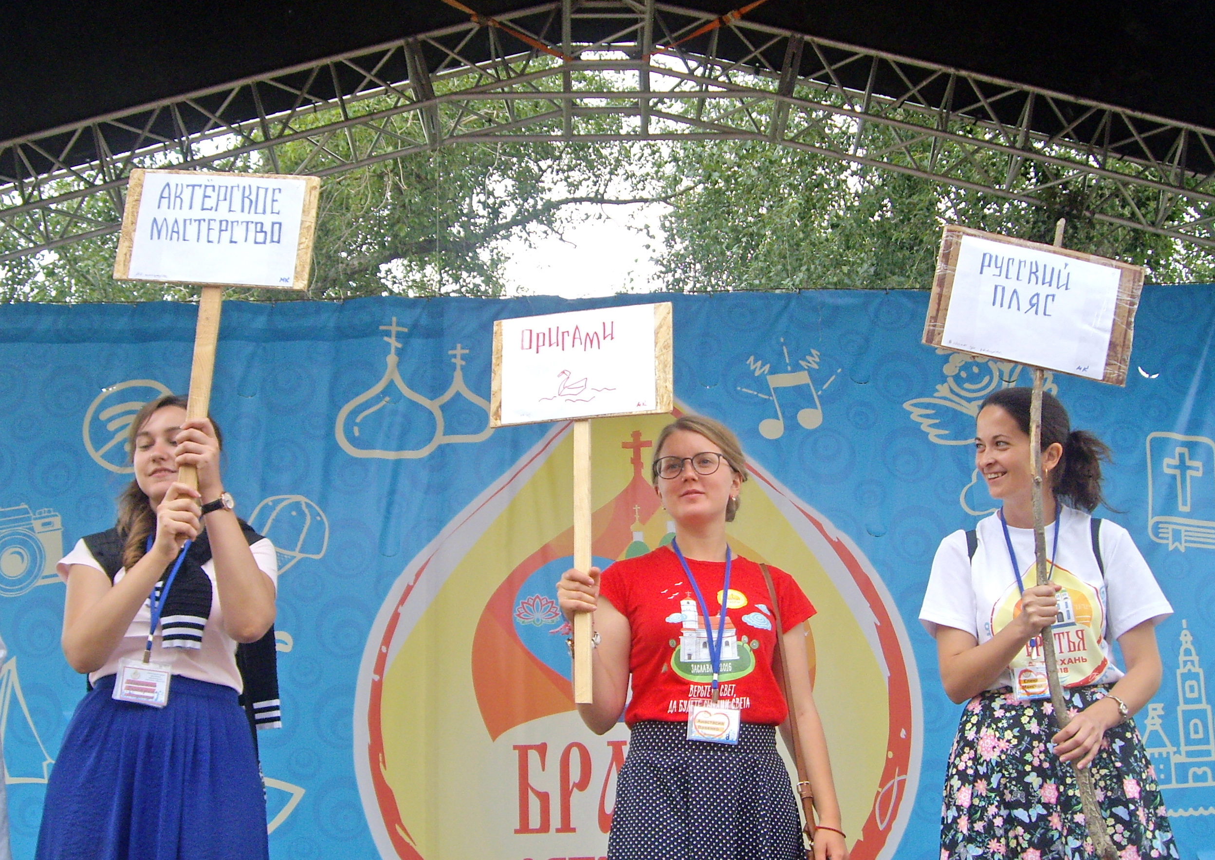 Таблички с названиями мастер-классов